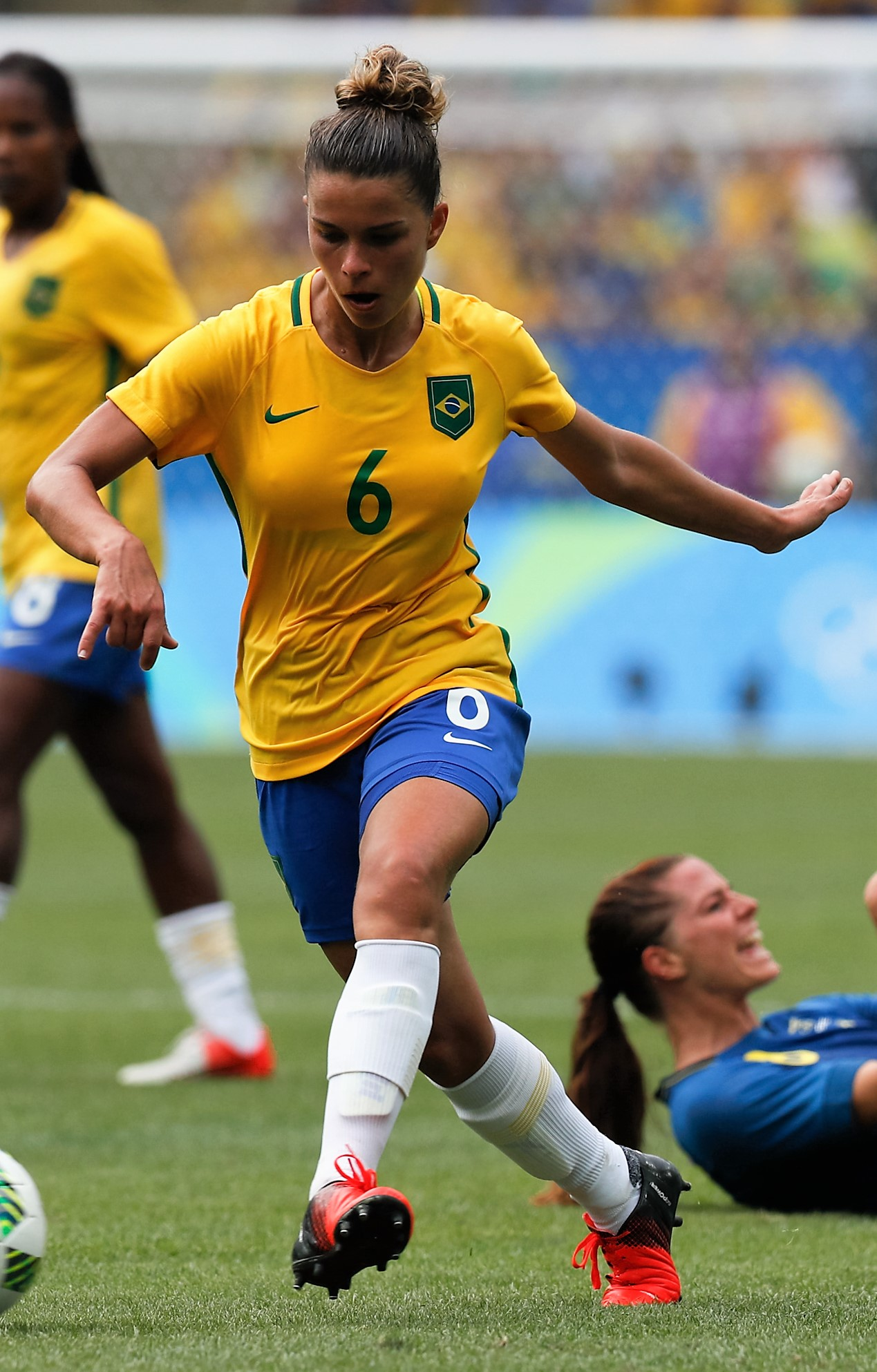 Rio de Janeiro - Seleção brasileira de futebol feminino disputa semifinal com a Suécia, no Maracanã. O Brasil perde nos pênaltis e vai disputar o bronze (Fernando Frazão/Agência Brasil)